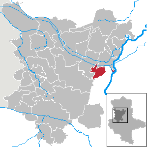 Barleben in Saxony-Anhalt (Country) - District (Landkreis) Börde